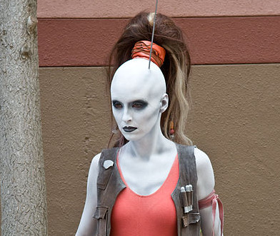 Aurra Sing Cropped